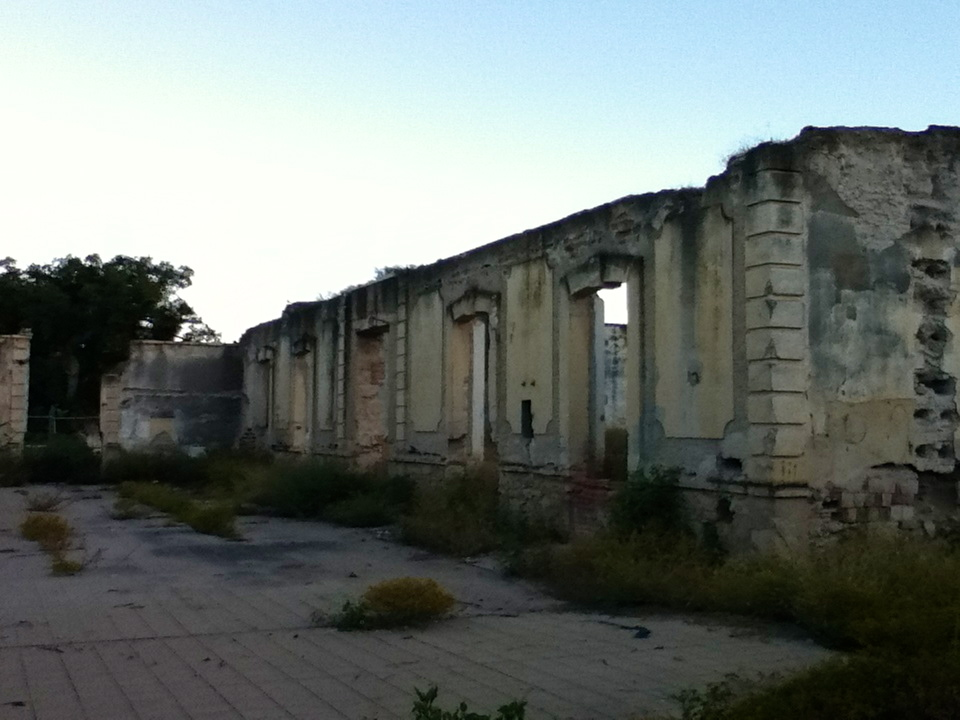 La Ex-Fabrica ubicada en Xaltepec . En la actualidad se encuentra en ruinas y es producto de varias leyendas entre los habitantes.